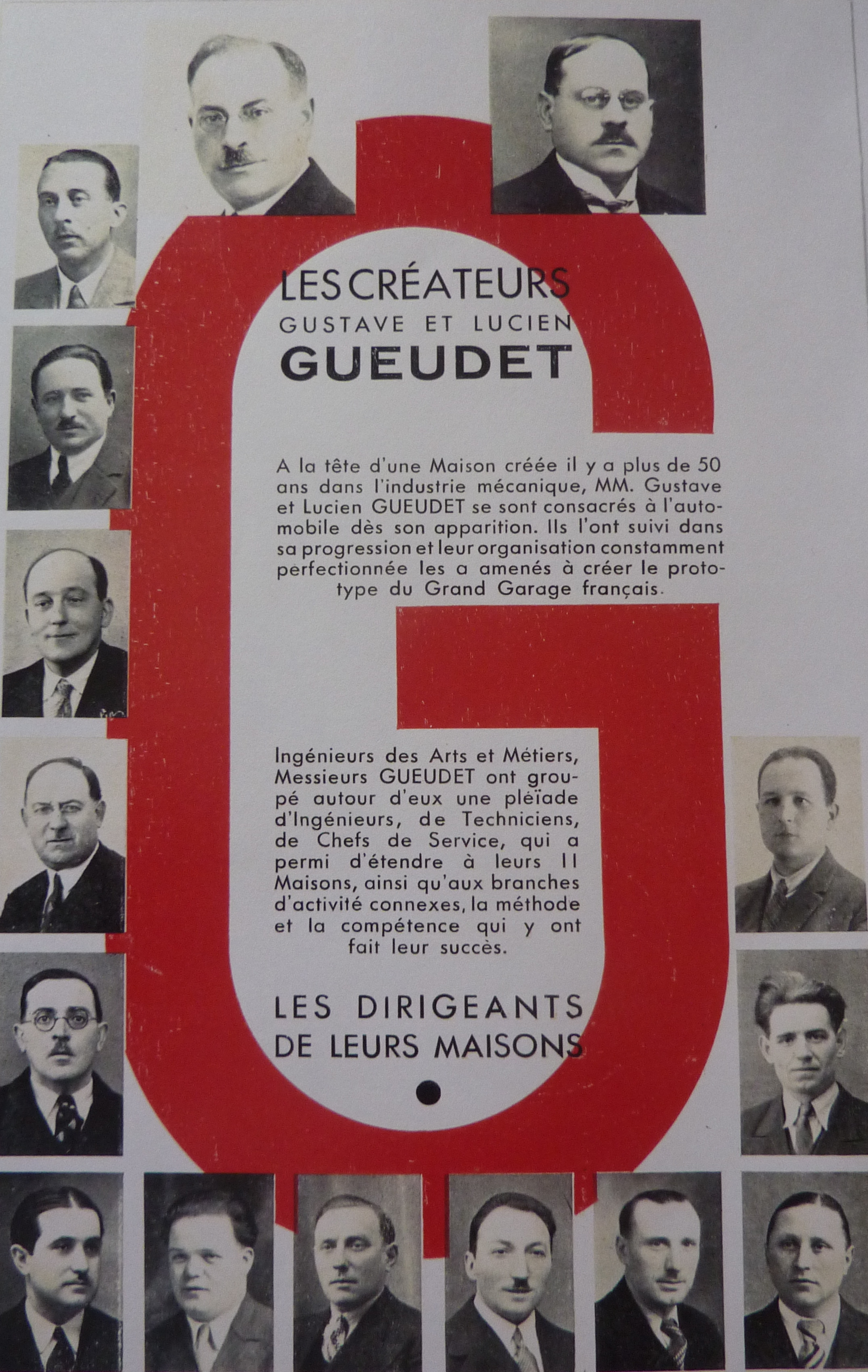 Les fondateurs du groupe Gueudet